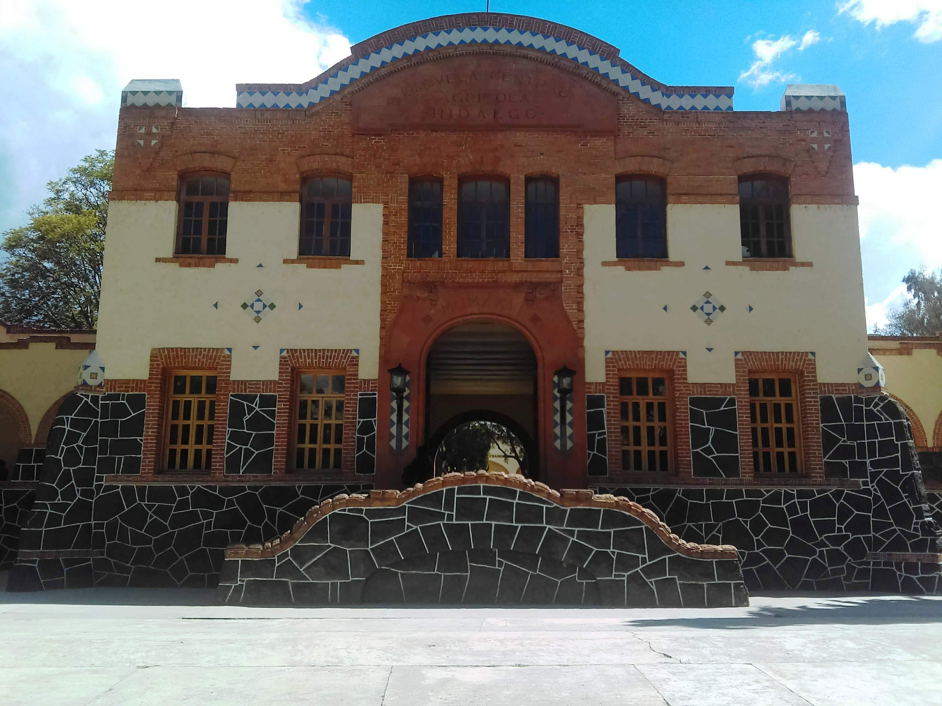 Instalaciones de la Universidad Politécnica de Francisco I. Madero (UPFIM), antigua sede de la Escuela Normal Rural Luis Villarreal. En la localidad de El Mexe, también conocida como Lázaro Cárdenas en el municipio de Francisco I. Madero, Hidalgo, México.